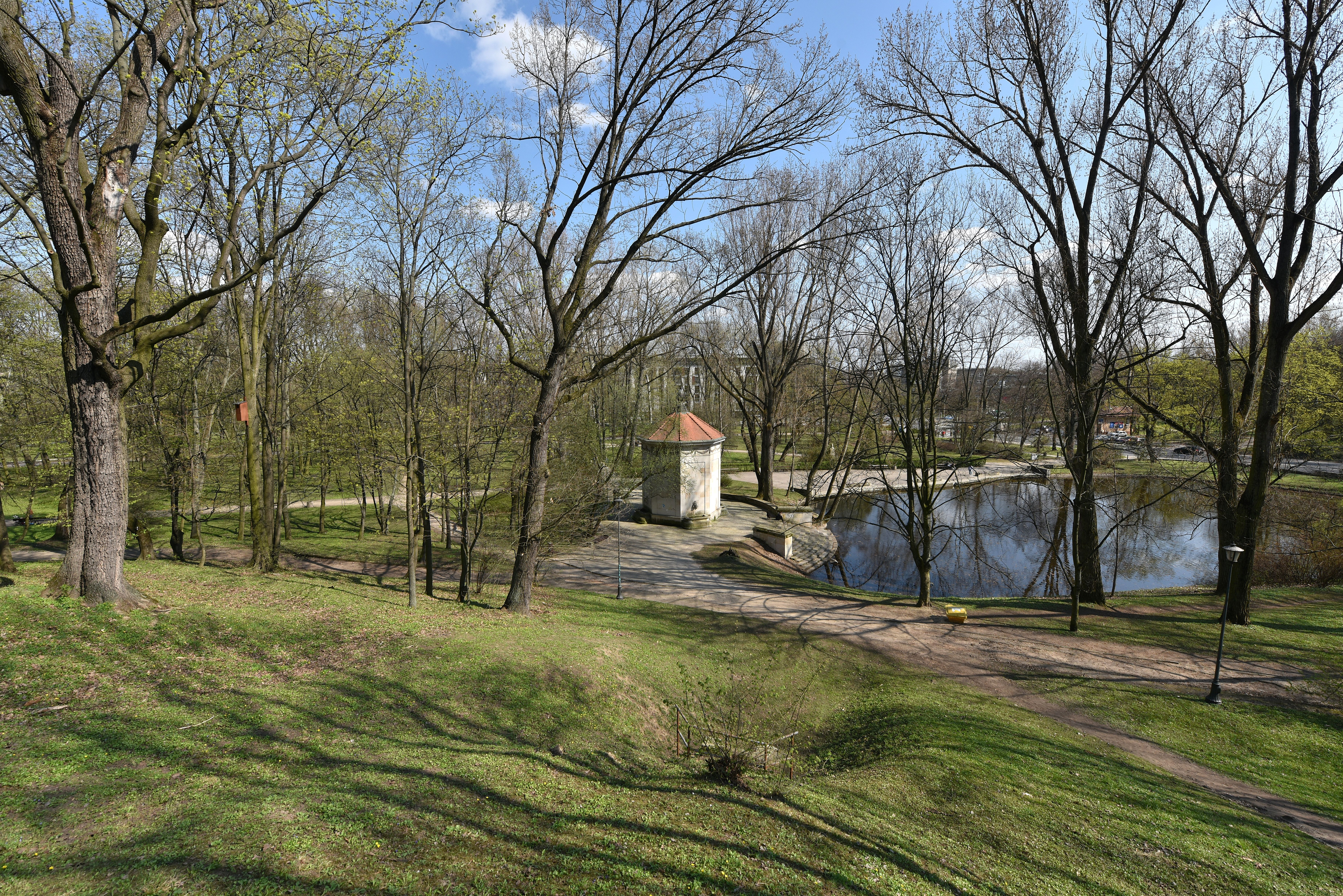 Park na Książęcem w Warszawie